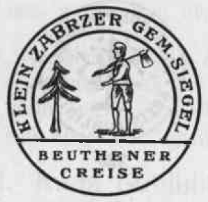 Altes Siegel bzw. Stempel der Gemeinde Klein-Zabrze im Kreis Beuthen, später Kreis Zabrze.